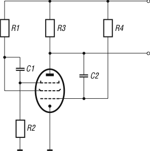 Schaltskizze eines Miller Integrators